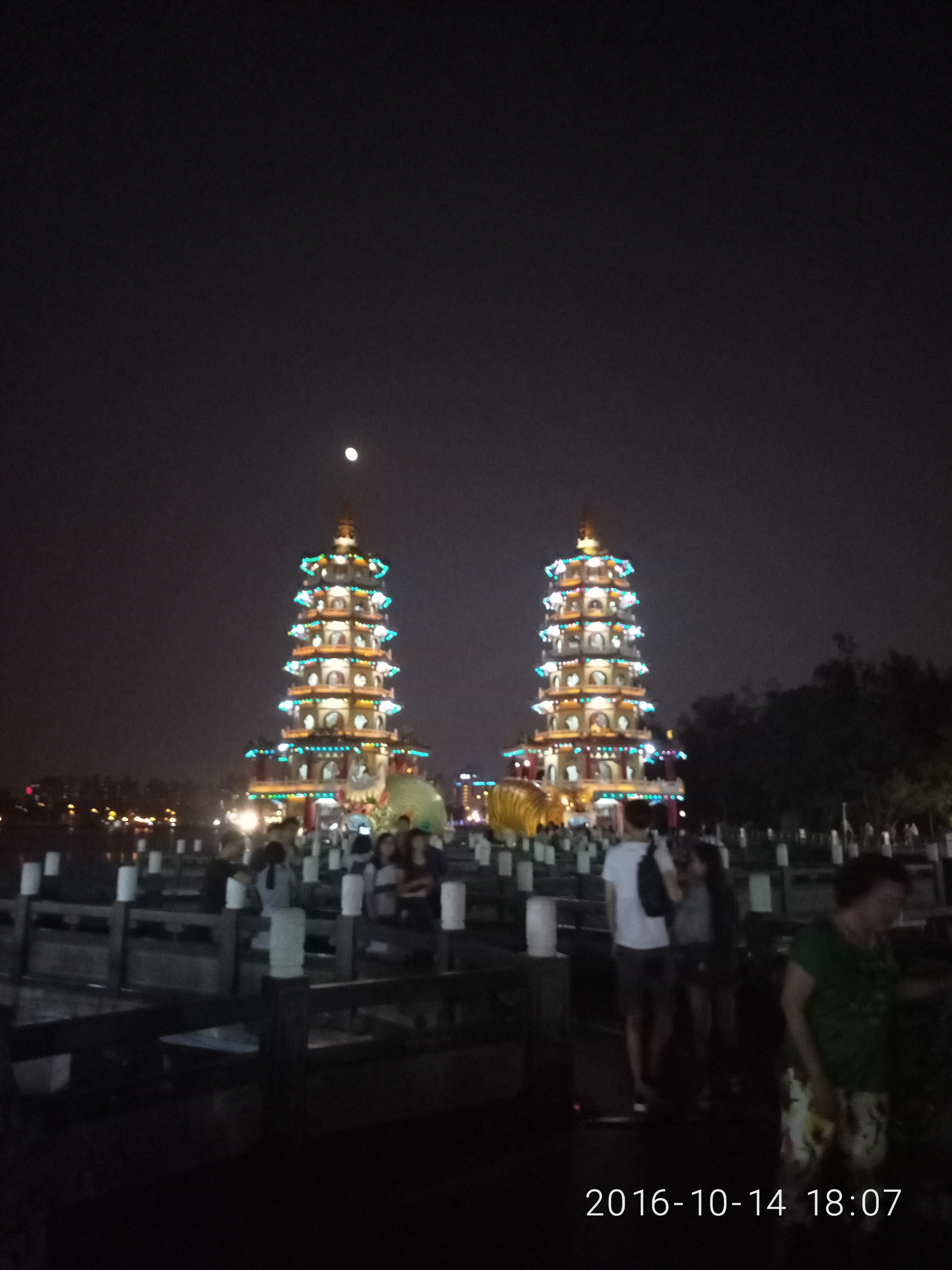 蓮池潭 龍虎塔夜景